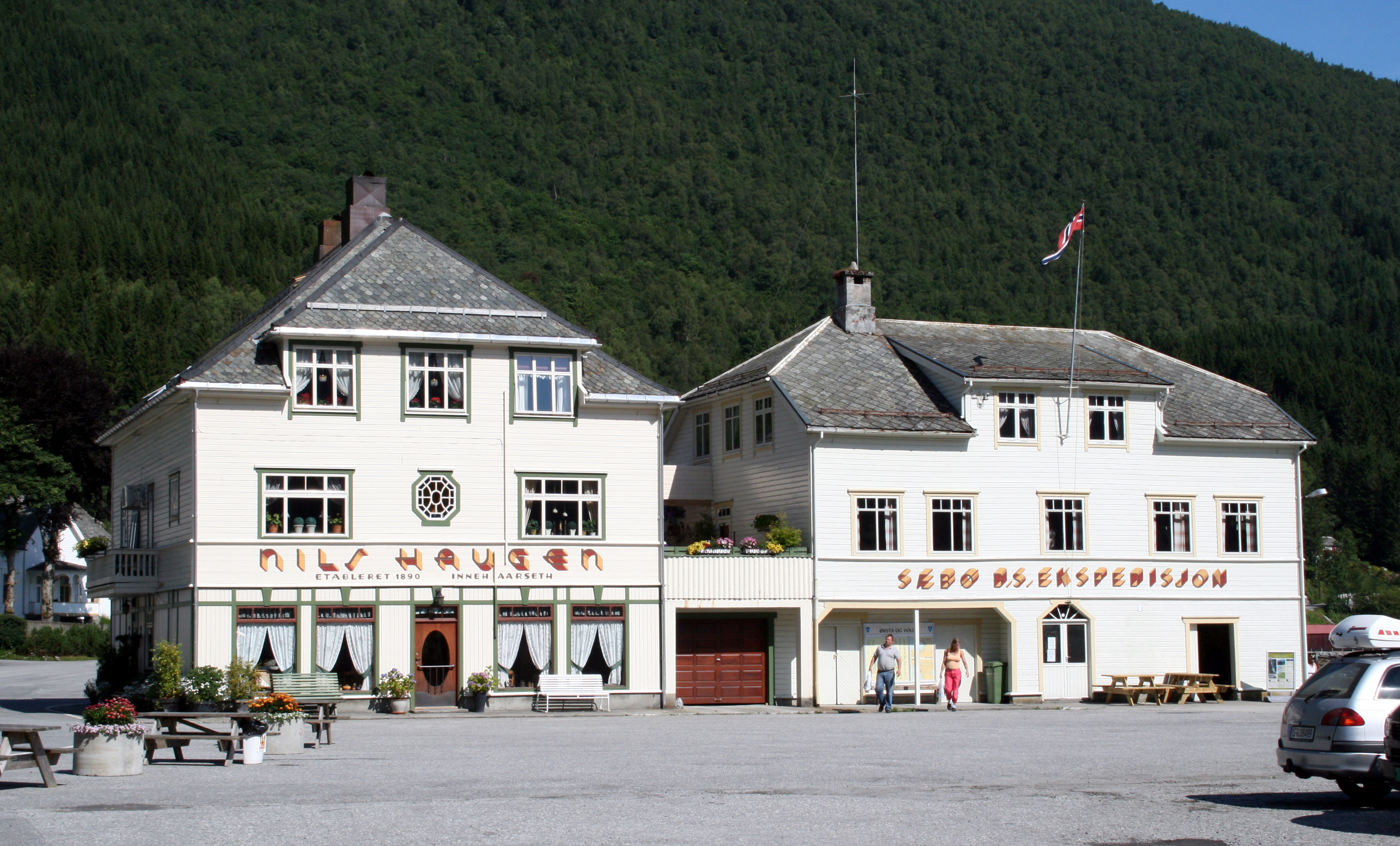 Sæbø på Sunnmøre